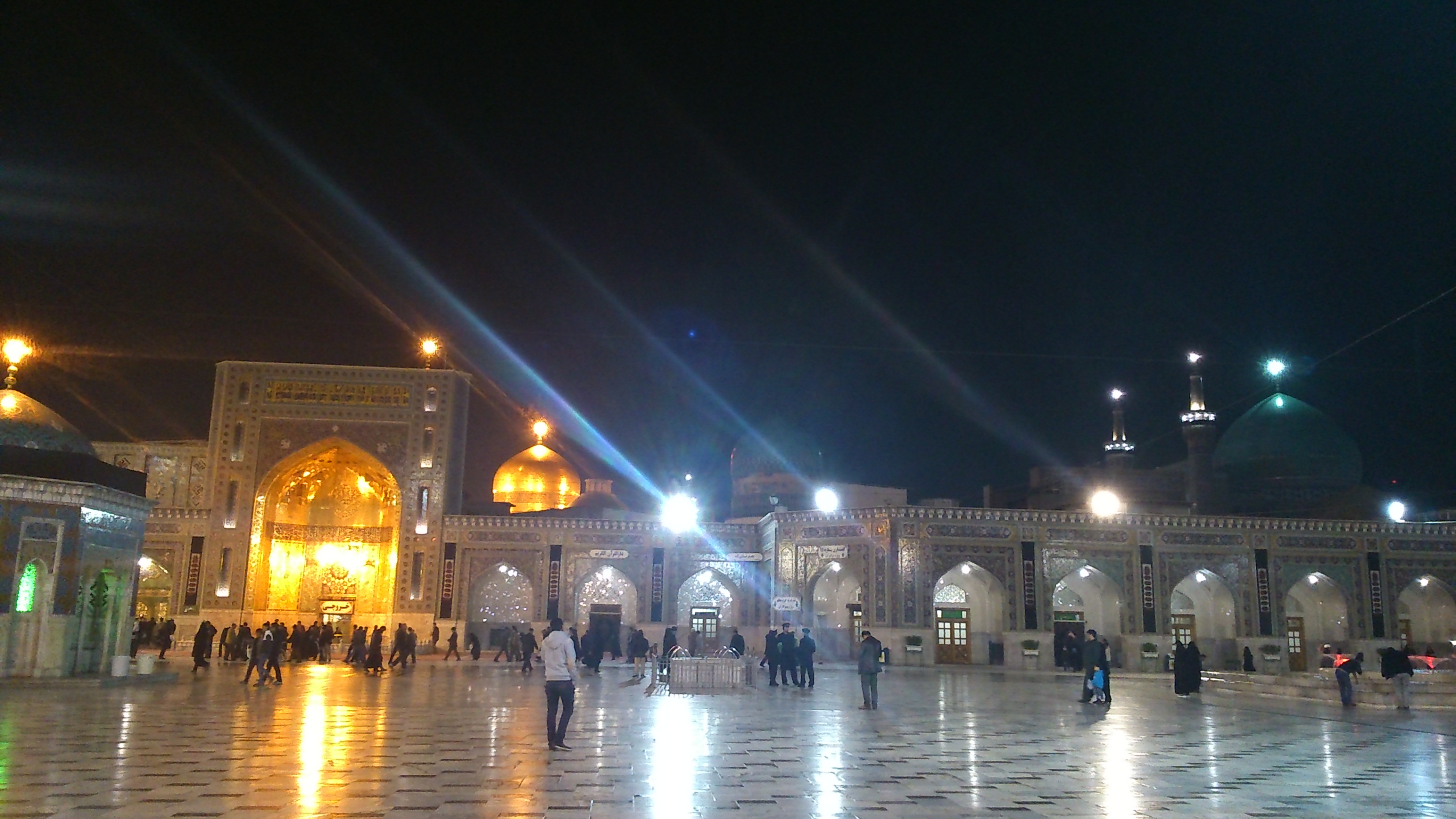 منظر حرم امام رضا از ورودی صحن جمهوری اسلامی